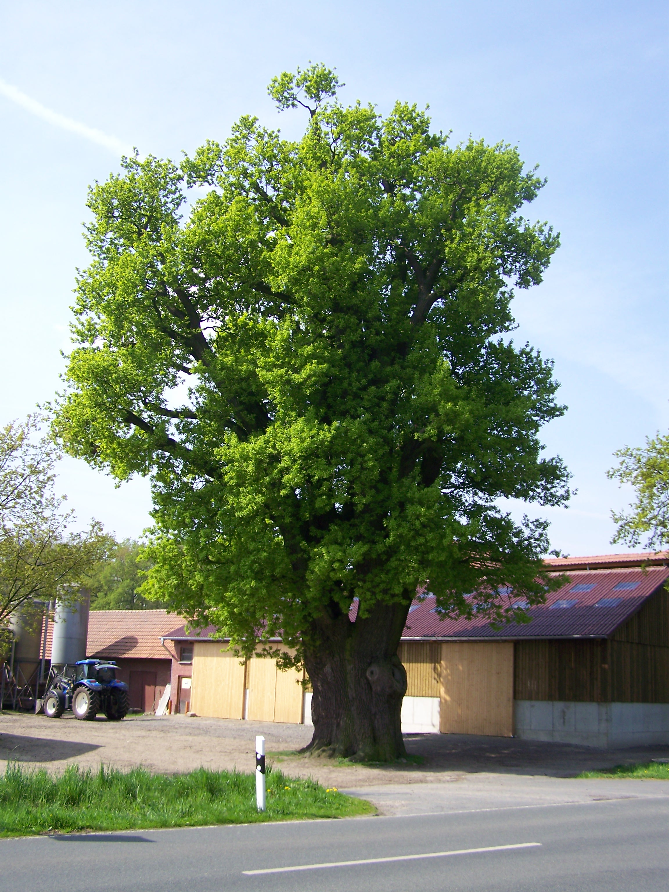 Brockmöllers Dicke Eiche in Hopsten (Quercus robur), Naturdenkmal I. E1 im Kreis Steinfurt